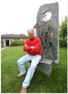 Tino Aime, Gravere (TO), 2010